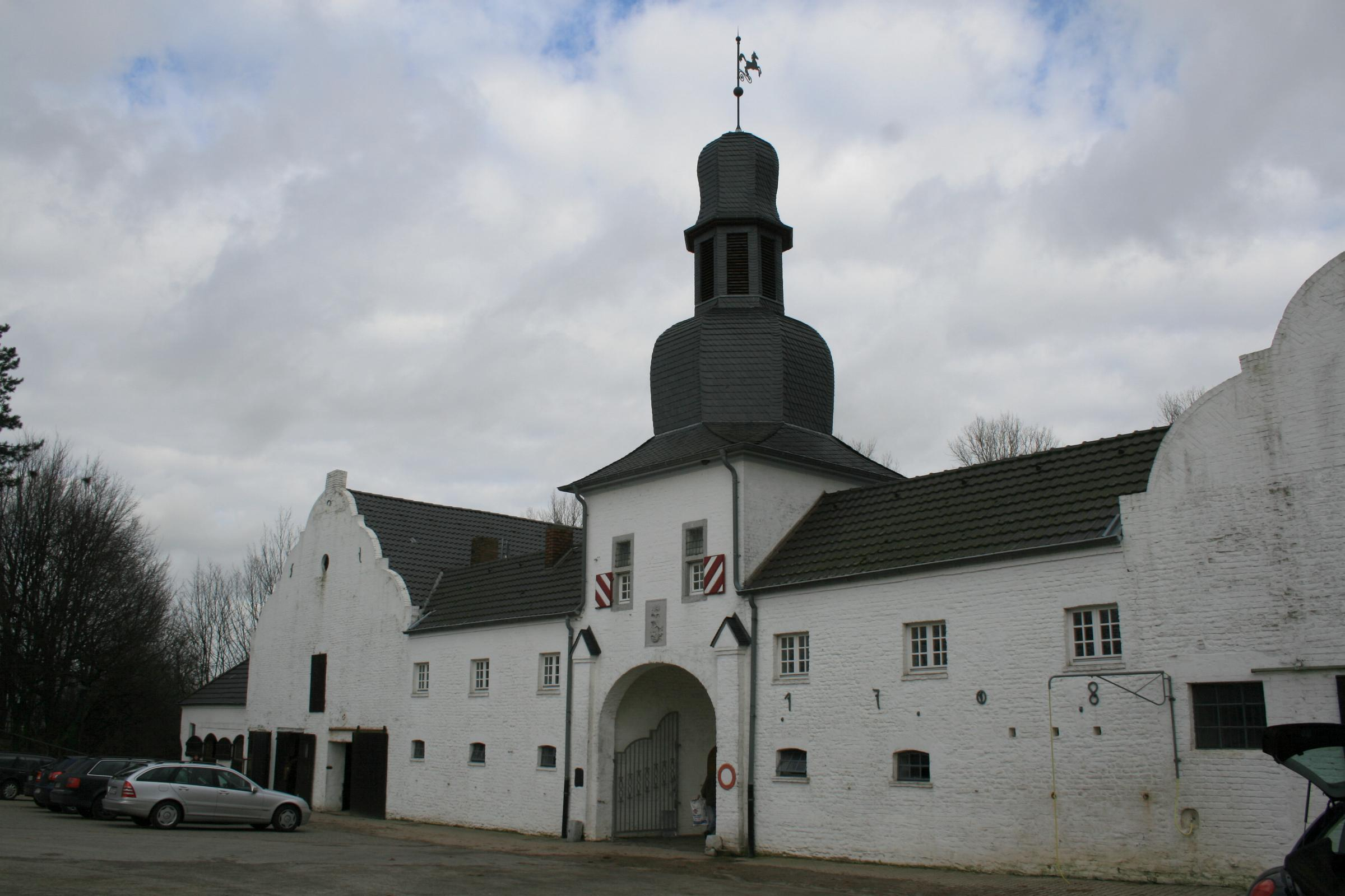 Gut Muthagen bei Hünshoven, Denkmal Nr. 39 in Geilenkirchen